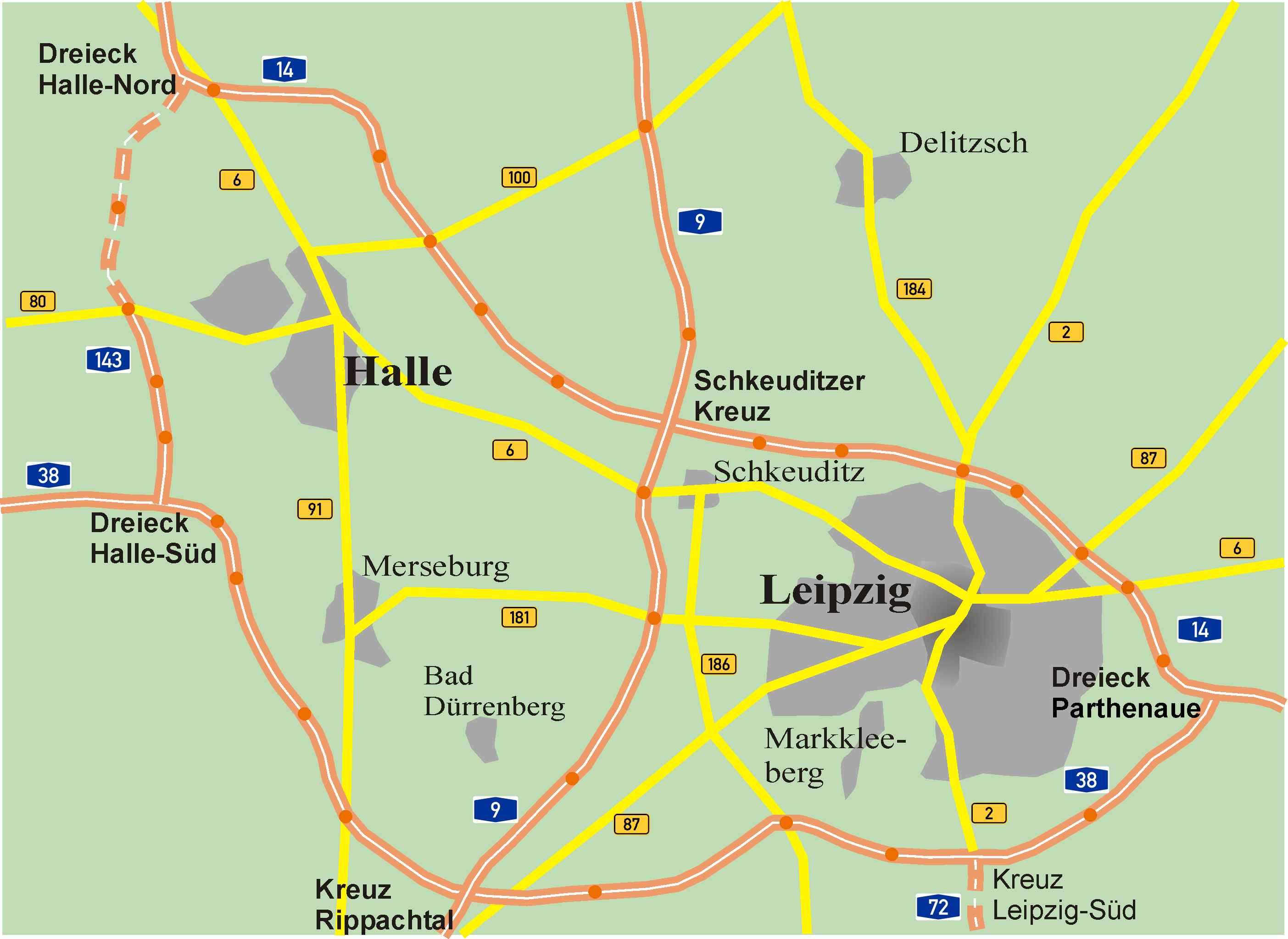 Mitteldeutsche Schleife